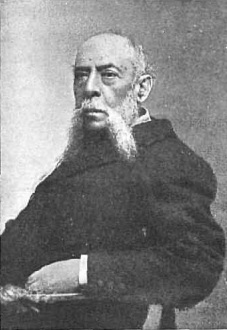 Sr. D. Manuel Ortiz de Pinedo, obra del fotógrafo Christian Franzen.